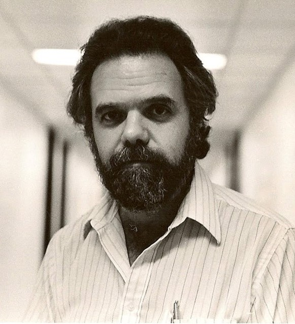 Newton Faller